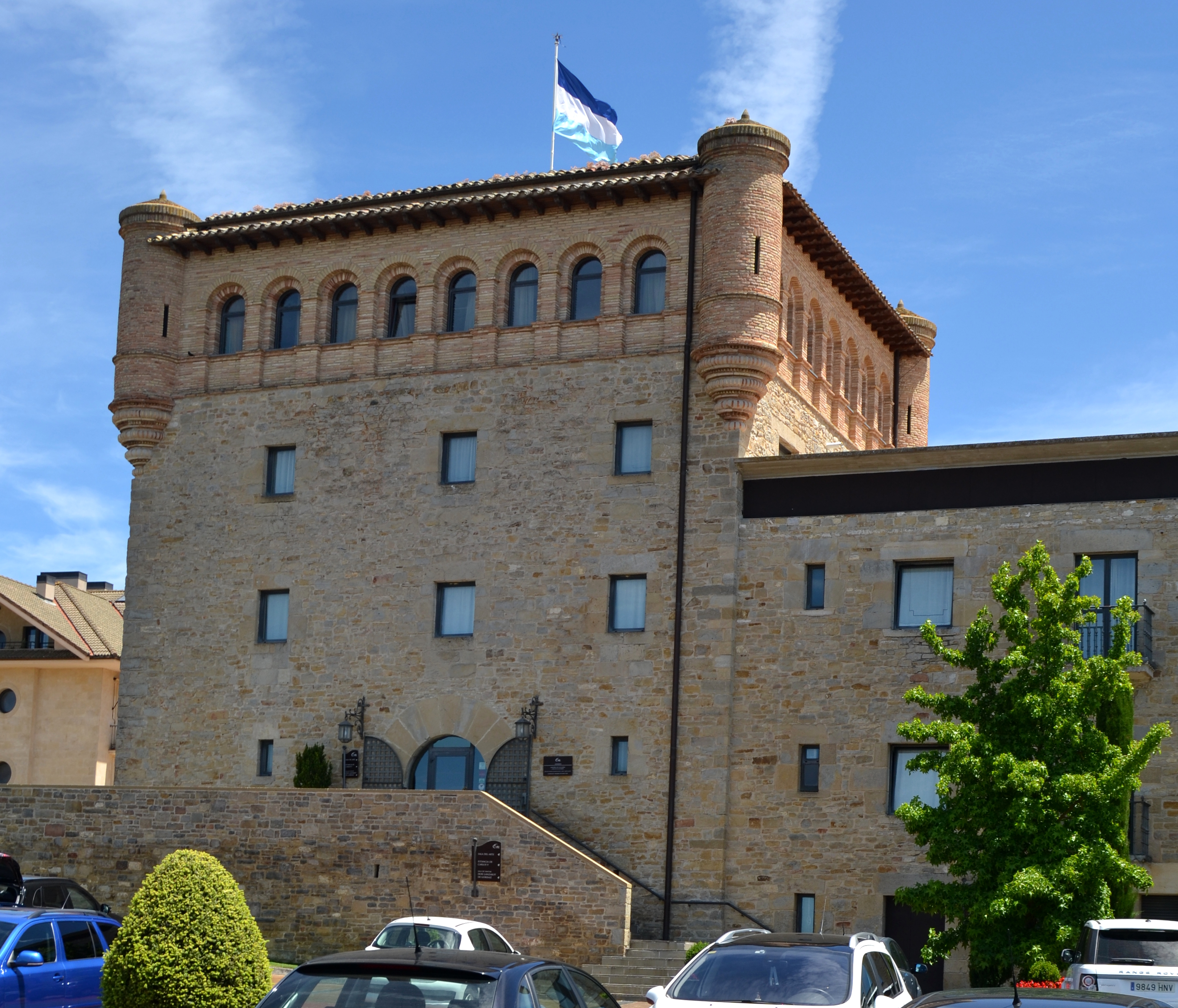 Gorraizko gaztelua, Nafarroa, Euskal Herria